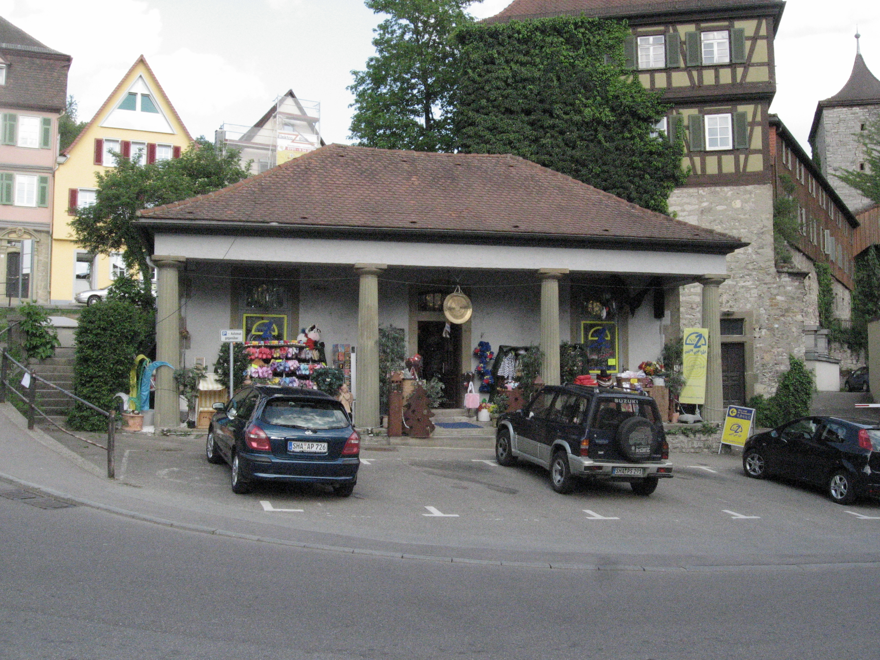 Blick über den westlichen Säumarkt nach ESE auf die Württembergische Wache, den Säumarktturm (zweistöckiger Fachwerkaufsatz) und den Malefizturm der Stadtbefestigung rechts dahinter. Die Württembergische Wache wurde vom neuen Landesherren erbaut, nachdem die vormalige Reichsstadt Schwäbisch Hall im Zuge der napoleonischen „Flurbereinigung“ an Württemberg fiel. Der Säumarktturm wurde während der zweiten Baustufe der Stadtbefestigung bis 1250 erbaut und stand über einen Meter vor der Stadtmauer (die im Bild also rechts an ihm vorbeizog). Der Fachwerkaufsatz stammt aus dem 18. bzw. 19. Jahrhundert. Der Malefizturm wurde um 1200 errichtet, also kurz nach dem Bau der Mauer, über die er nicht nach außen herausragt. Er hat rechteckigen Querschnitt mit der langen Seite parallel zur Mauer. Im Untergeschoss ein verliesartiger Raum, der Turm diente auch als Gefängnis. Das eben zu erkennende, gegen das Stadtinnere zu holzverkleidete Langgebäude zwischen den beiden Türmen ist ein im 18. Jahrhundert auf dem ehemaligen Zwinger errichtetes Gefängnis der Stadt. An der Außenseite dem ehemaligen Graben zu steht auf einer Informationstafel: „Gefängnis statt Stadtmauer Auf Resten der Stadtmauer, die nicht mehr gebraucht wurde, baute sich die Stadt um 1740 ein Gefängnis. Zwingermauer und innere Stadtmauer bildeten ganz pragmatisch die Begrenzung des schlanken Gebäudes, das ein Mansarddach ziert, eine typische Dachform des 18. Jahrhunderts. Früher lag der Graben natürlich deutlich tiefer. Der daran anschließende Säumarktturm erhielt erst sein zweites Fachwerkgeschoss in den 1930er Jahren, als er von der NDSAP genutzt wurde.“ Sonstige Angaben nach: Eduard Krüger: Die Stadtbefestigung von Schwäbisch Hall, Verlag Hans P. Eppinger, Schwäbisch Hall, 1966.